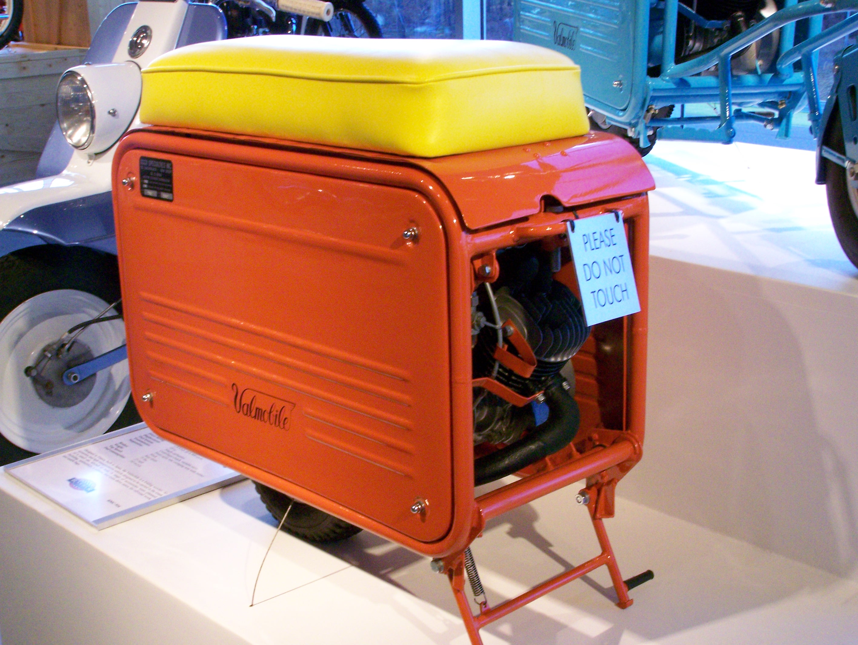 Barber Vintage Museum_536 Hirano Valmobile